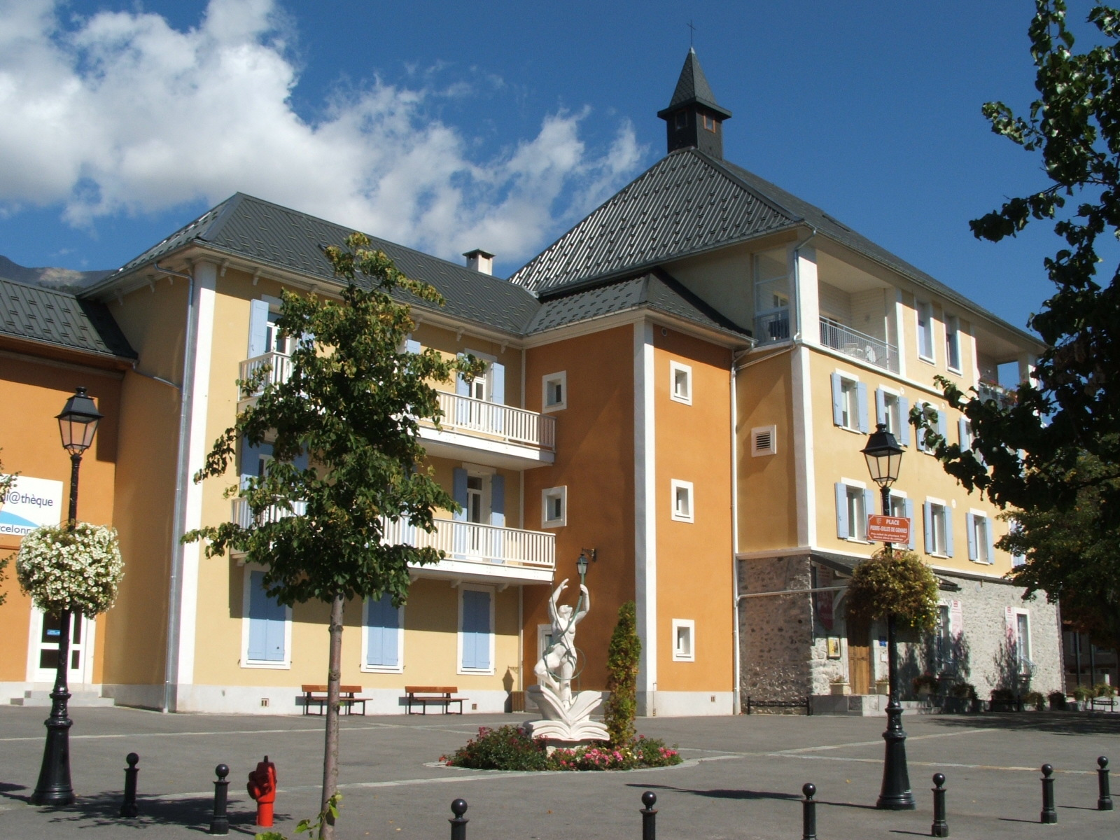 Barcelonnette, département des Alpes-de-Haute-Provence, France